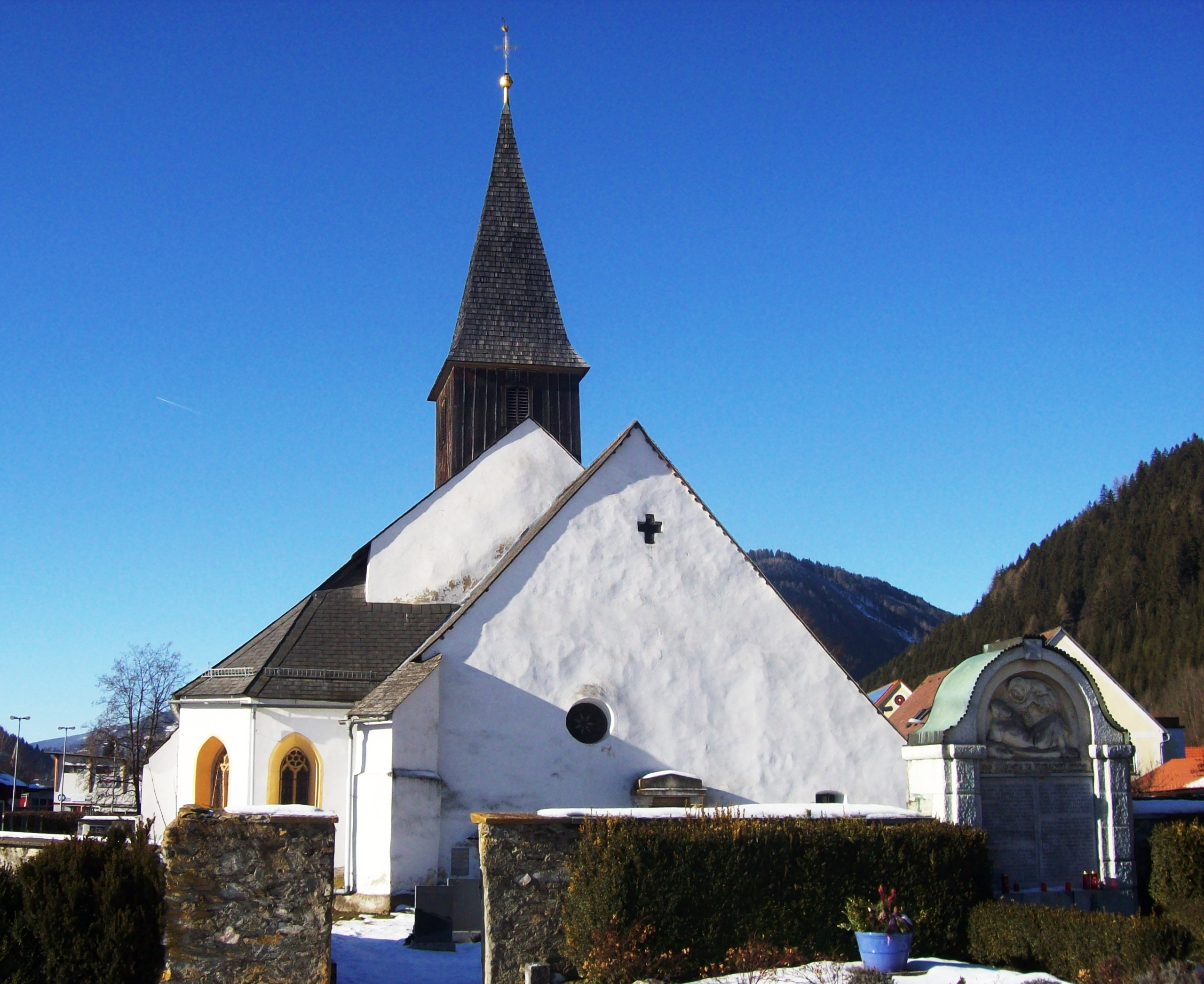 Kath. Filialkirche hl. Ägydius mit Friedhof und Kriegerdenkmal